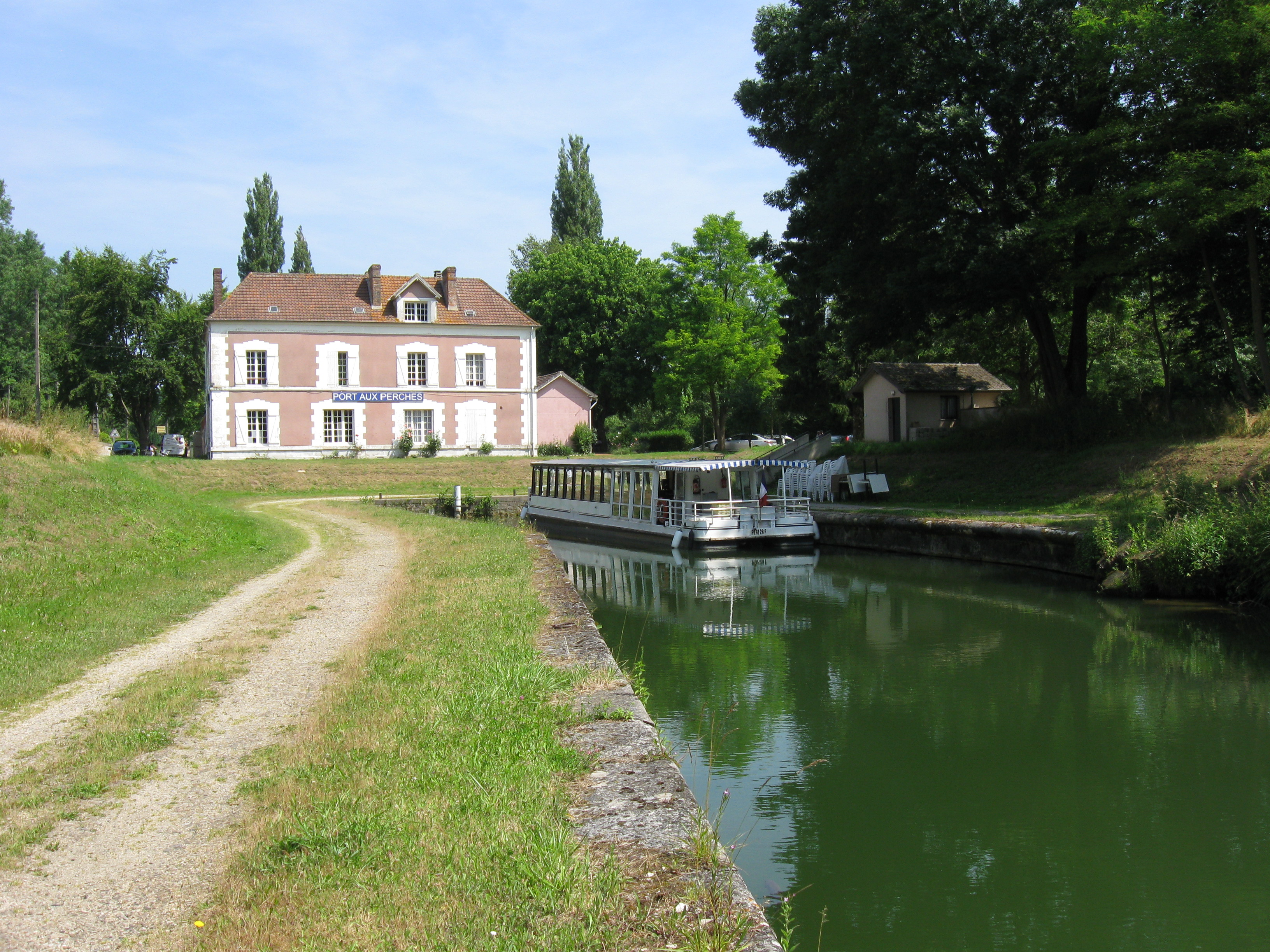 Halte fluviale "Le port aux perches". (Silly-la-Poterie département de l'Aisne, région Picardie).